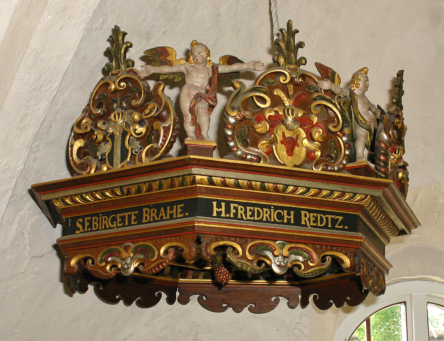 Kirche von Undløse, Dänemark (West-Seeland). Kanzel von 1643 ist von Abel Schrøder dem Jüngeren aus Næstved geschnitzt (restauriert 1936). Am Schalldeckel die Inschrift: S(alig) F(ru) Birgete Brahe. H(r) Fredrich Redtz. Frw Sophia Høgh. Anno domini. 1644. Die Inschrift auf der Kanzel: Salige Ære De Som Høre Guds Ord Oc bevare Dett. Luc. c. II v. 28 und Til Guds Ære af Æ(rværdige) og velb(yrdige) H(r) Frederich Redtz oc f(ru) Sophia Høgh Til denne Sted foræritt.